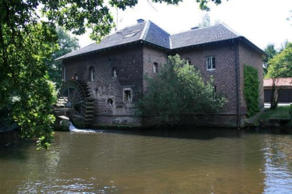 Mühlenhaus Brempter Mühle